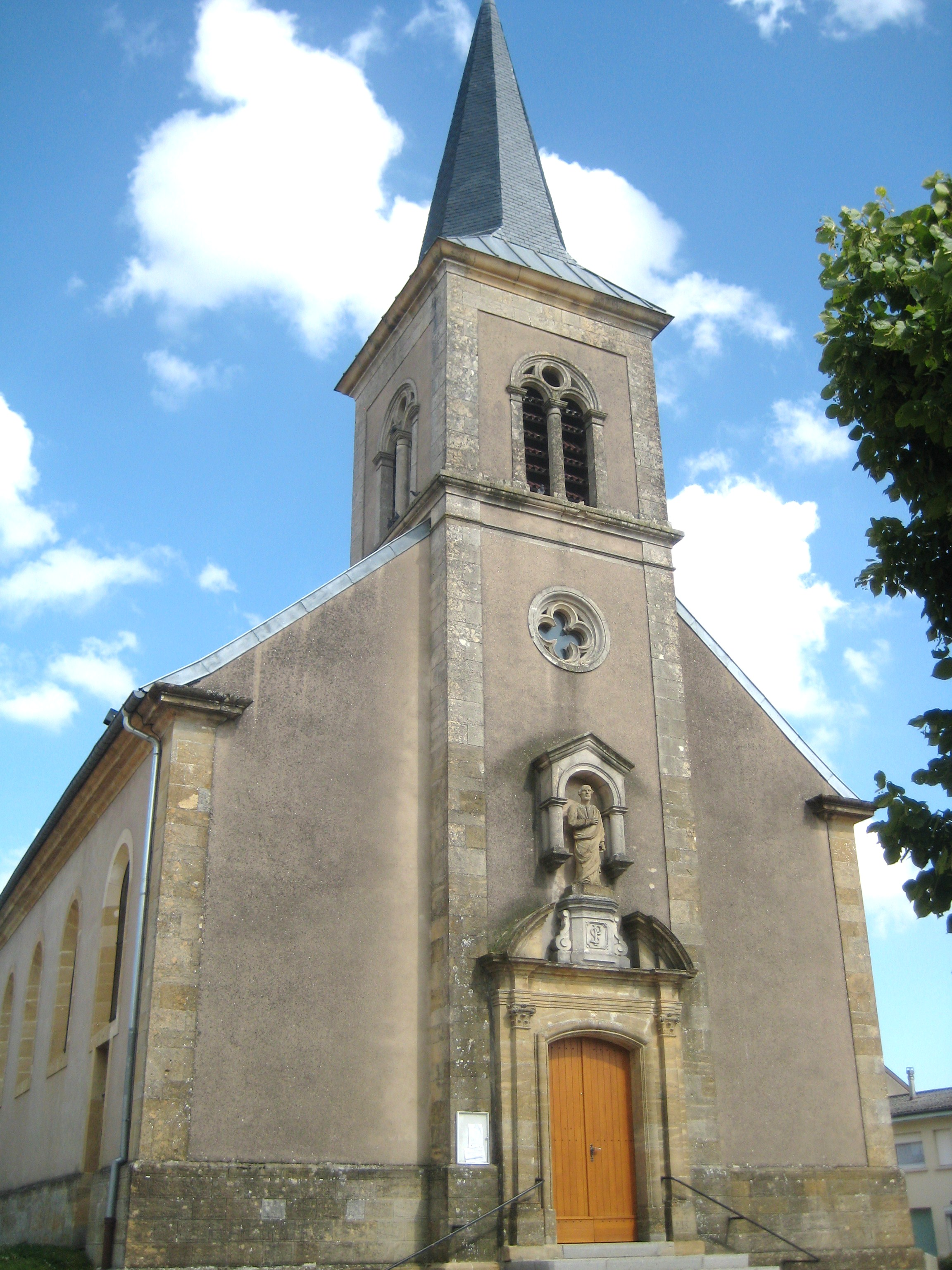 Description Eglise paroissiale Saint-Pierre Tressange Date4 August 2011Sourcemon appareil photoAuthorAimelaimePermission (Reusing this file) Eglise paroissiale Saint-Pierre Tressange